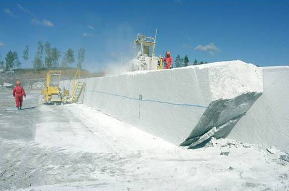 Процесс добычи камня Туликиви